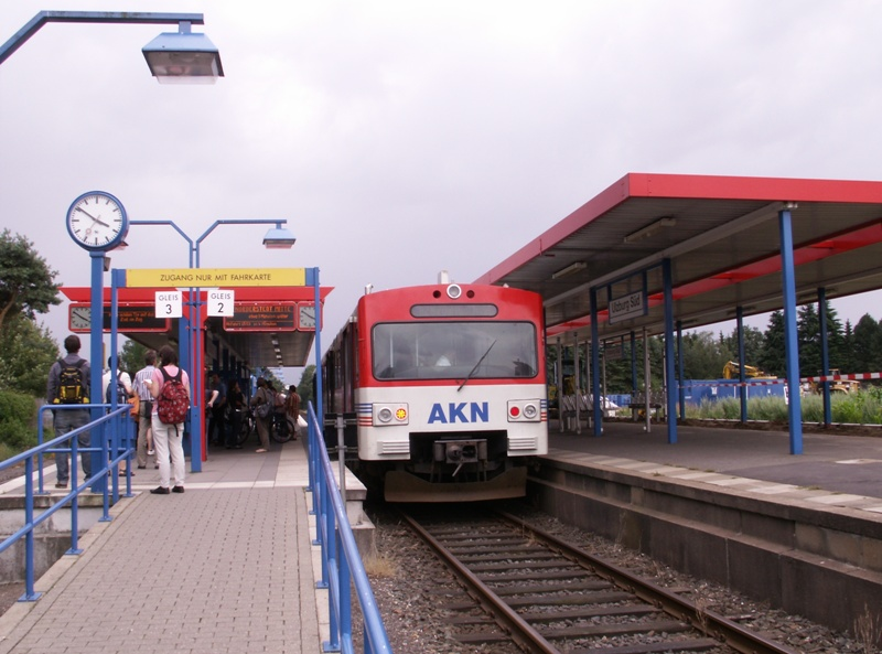 AKN Bahn 2007